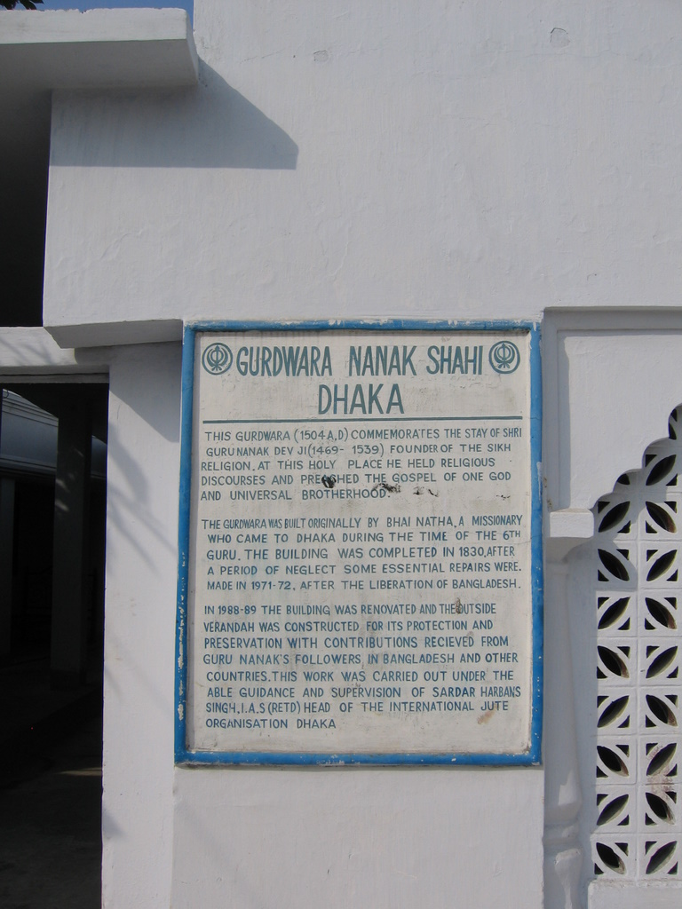 Gurdwara Nanakshahi Dhaka, a Sikh Temple in Dhaka, Bangladesh